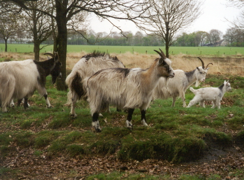 Nederlandse Landgeit geiten